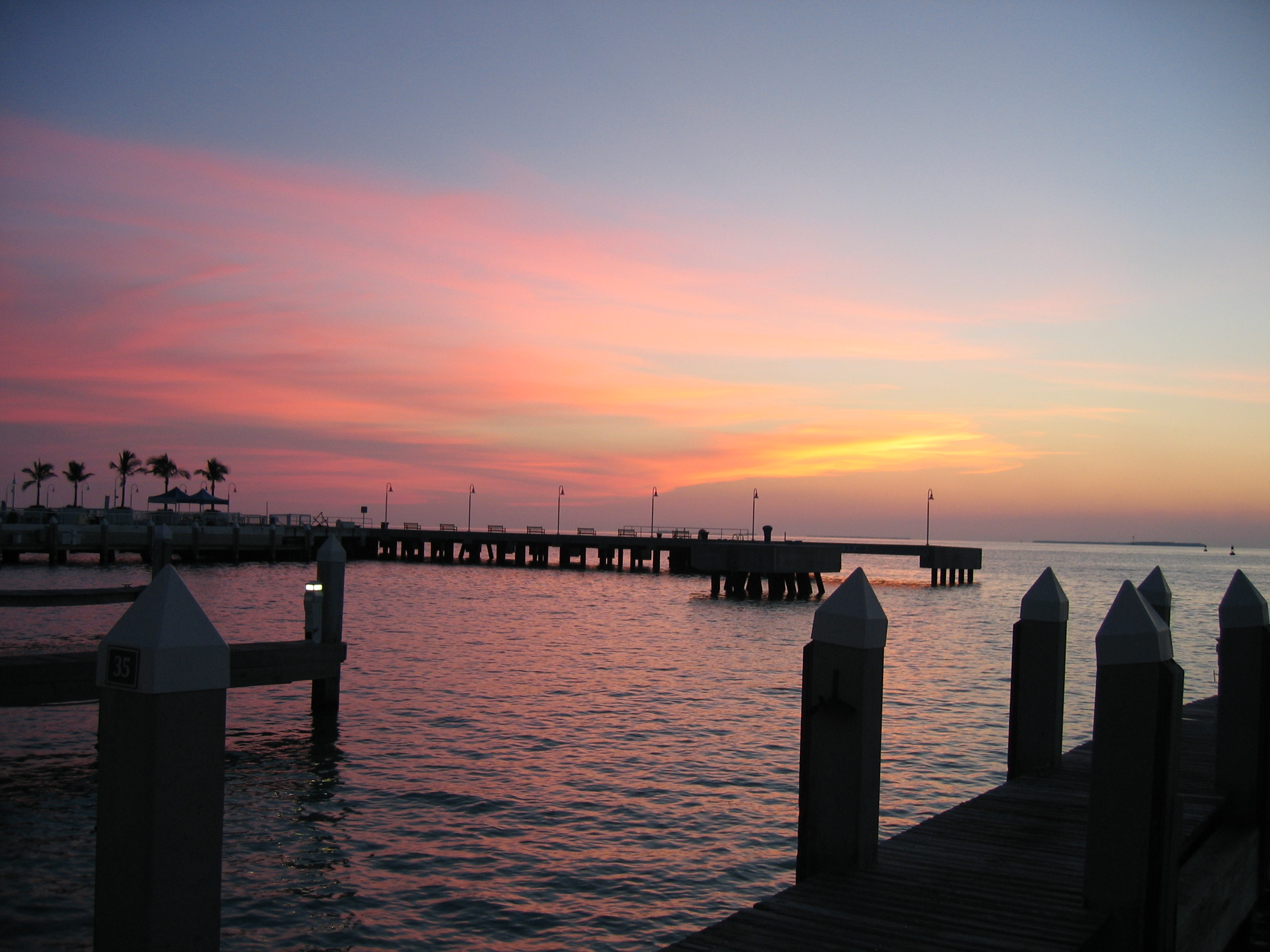 Key West Sunset